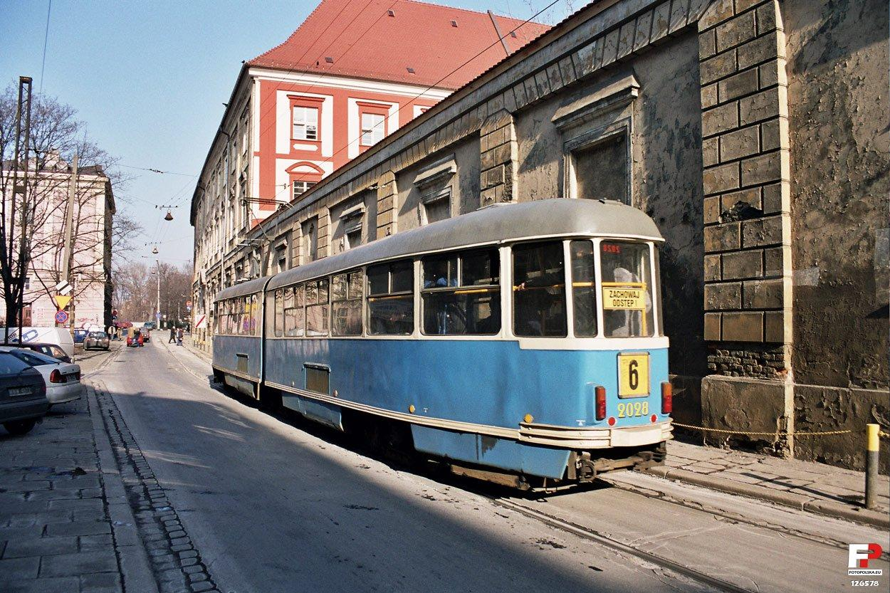 Ulica Szewska przed przebudową.